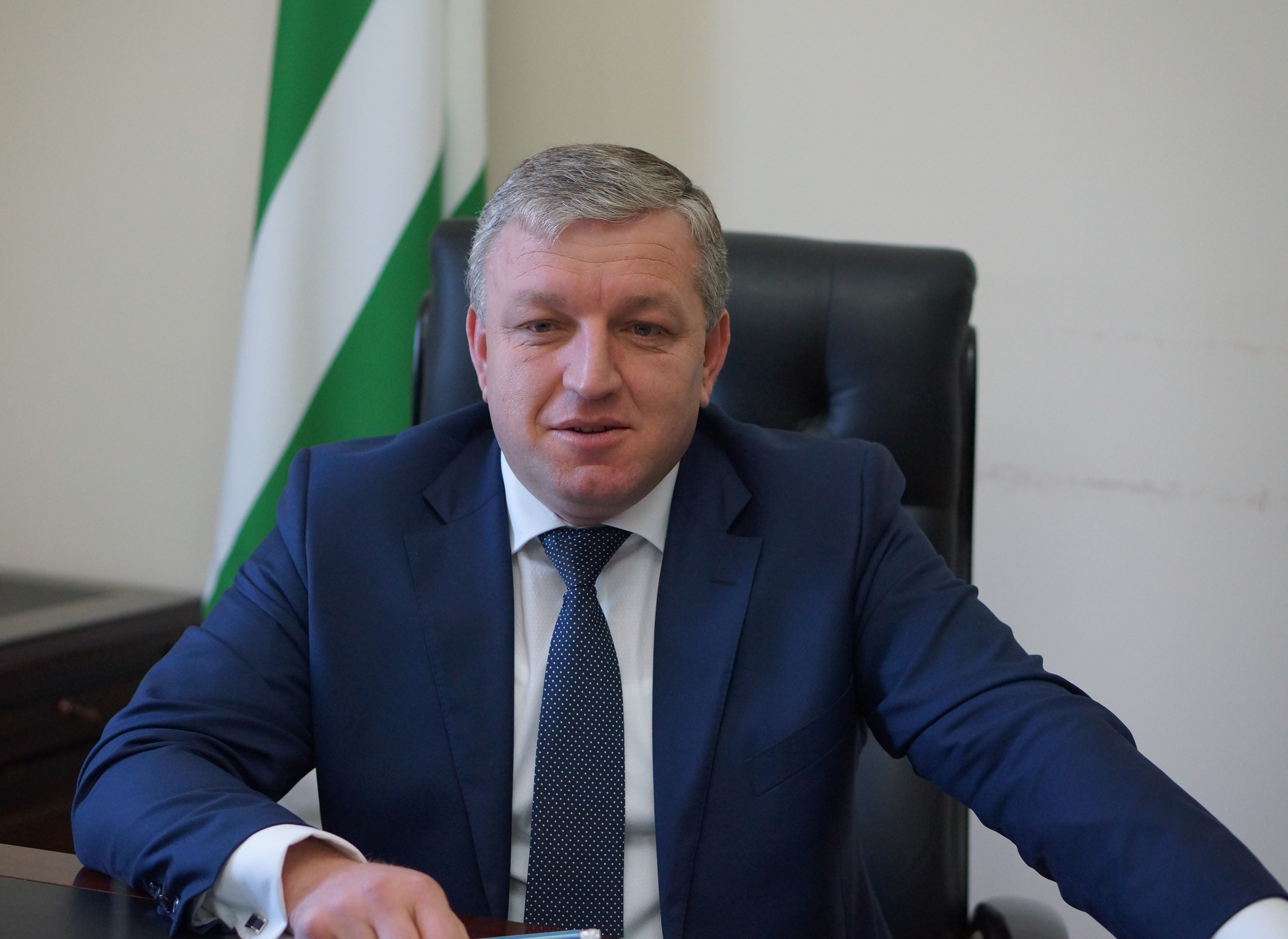 " Премьер — министр РА Беслан Барциц"